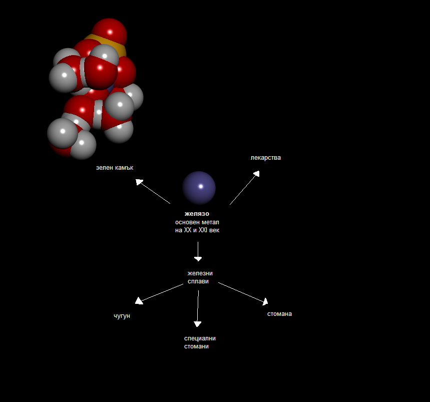 Приложение на желязото